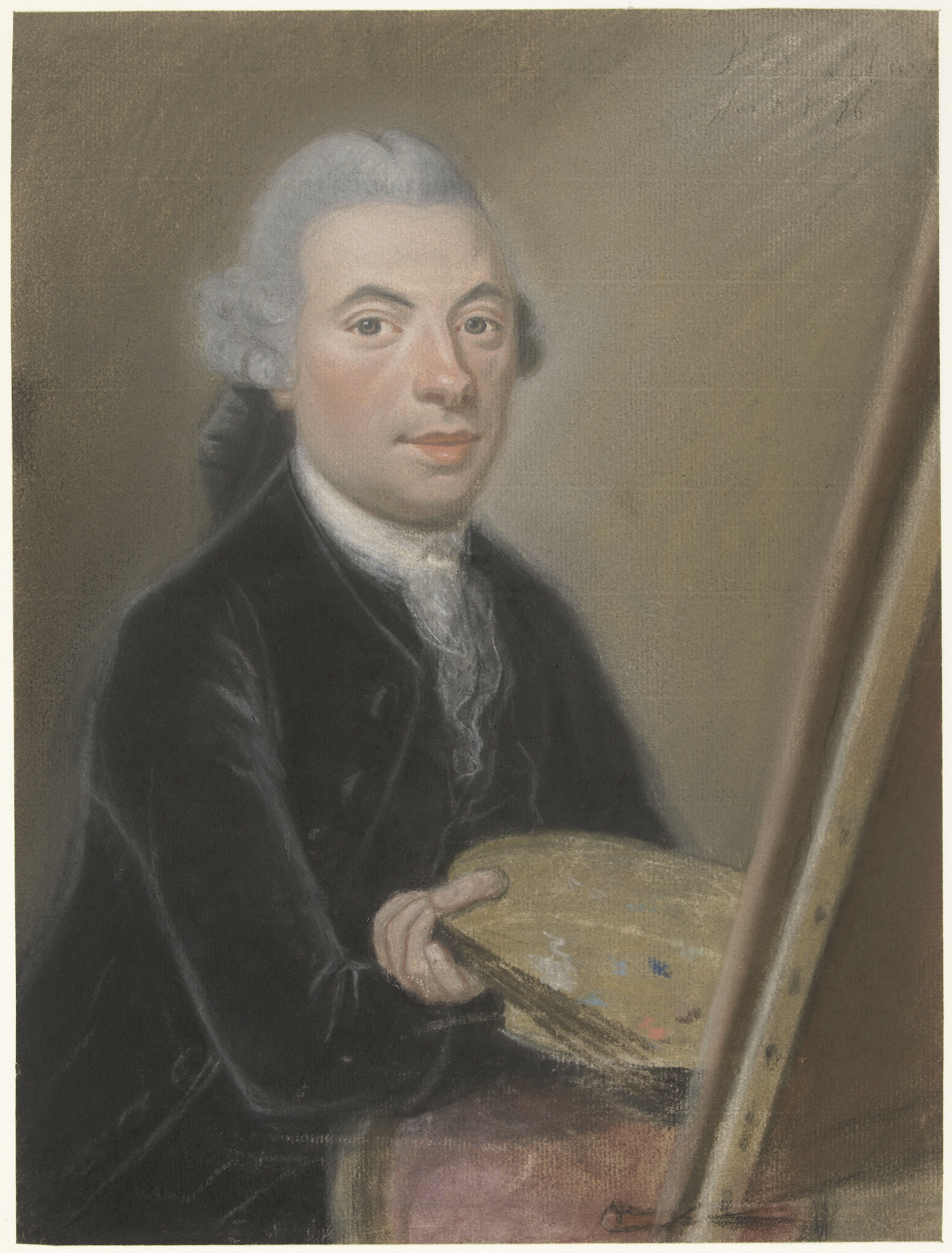 Identificatie Titel(s)Portret van Jan van Os Objecttypetekening ObjectnummerRP-T-1894-A-3013 Vervaardiging Vervaardiger tekenaar: Pieter Frederik de la Croix Dateringjan-1776 Materiaal en Techniek Fysieke kenmerkenpastelkrijt Materiaalpapier pastelkrijt Afmetingenh 338 mm × b 255 mm Onderwerp Wat portrait, self-portrait of artist portrait, self-portrait of draughtsman historical person (OS, JAN VAN) - historical person (OS, JAN VAN) portrayed alone Wie Jan van Os Verwerving en rechten Verwerving apr-1894 CopyrightPubliek domein Relaties Gerelateerd Portret van Susanna van Os - de la Croix